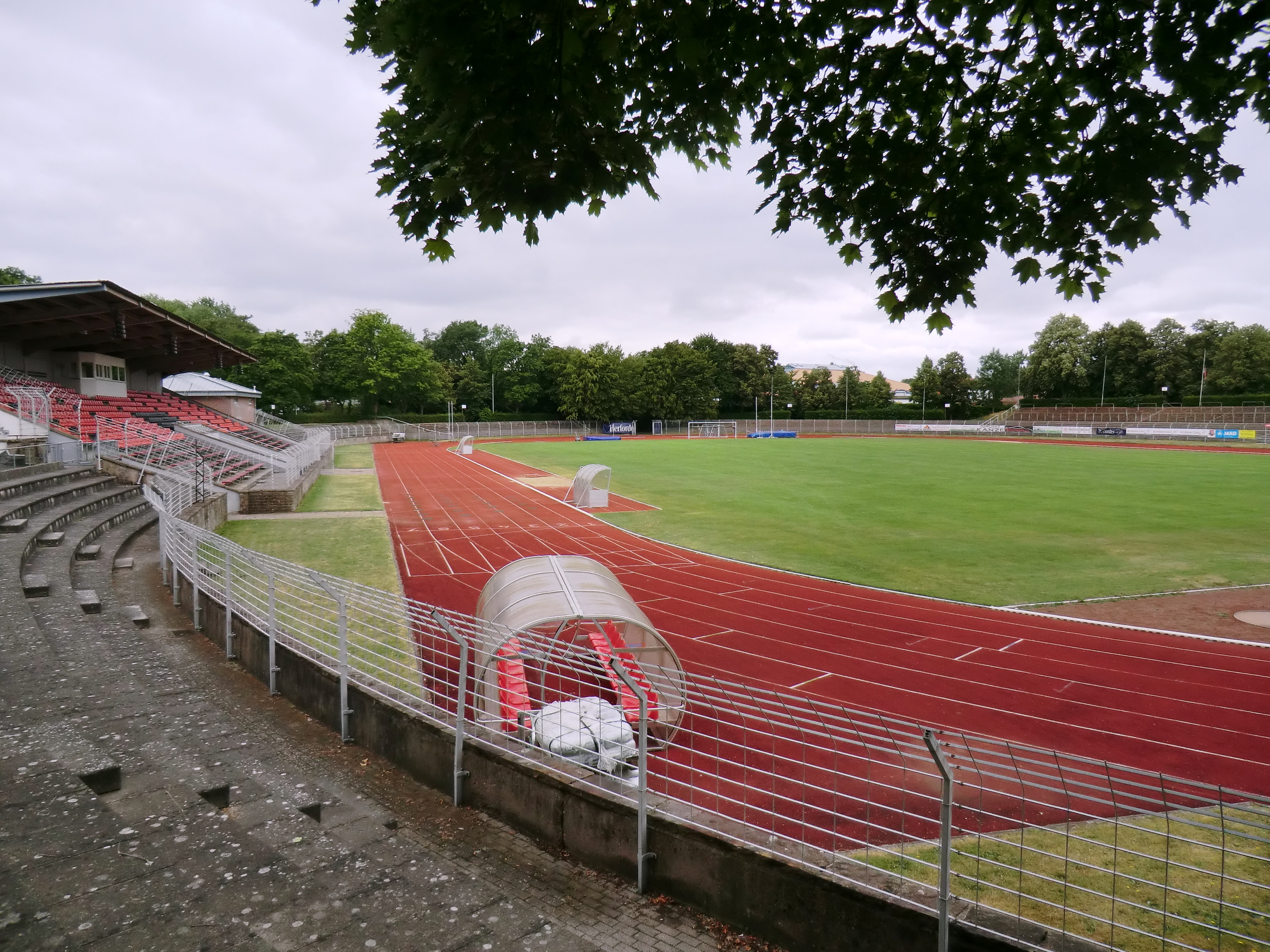 Ludwig-Jahn-Stadion